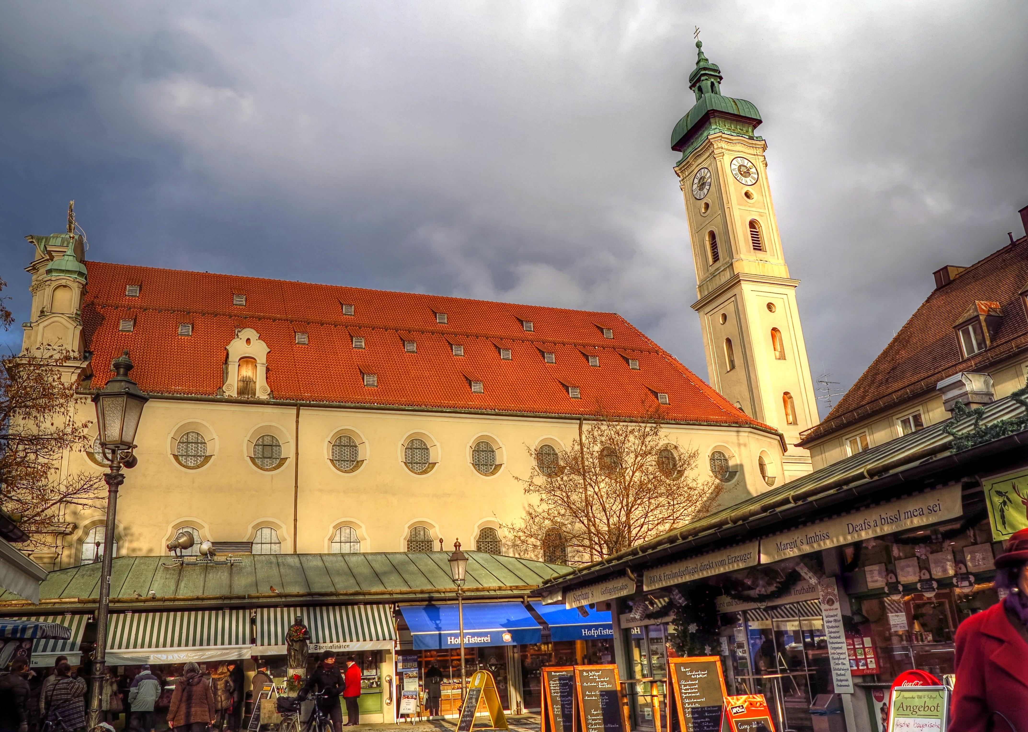 München, Viktualienmarkt mit Blick auf die Heilig-Geist-Kirche (HDR-Bild)